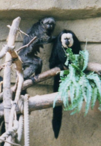 Pale Headed Saki